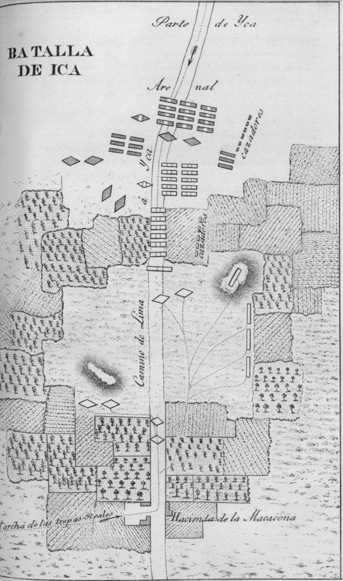 Croquis de la batalla de Ica, 7 de abril de 1822.